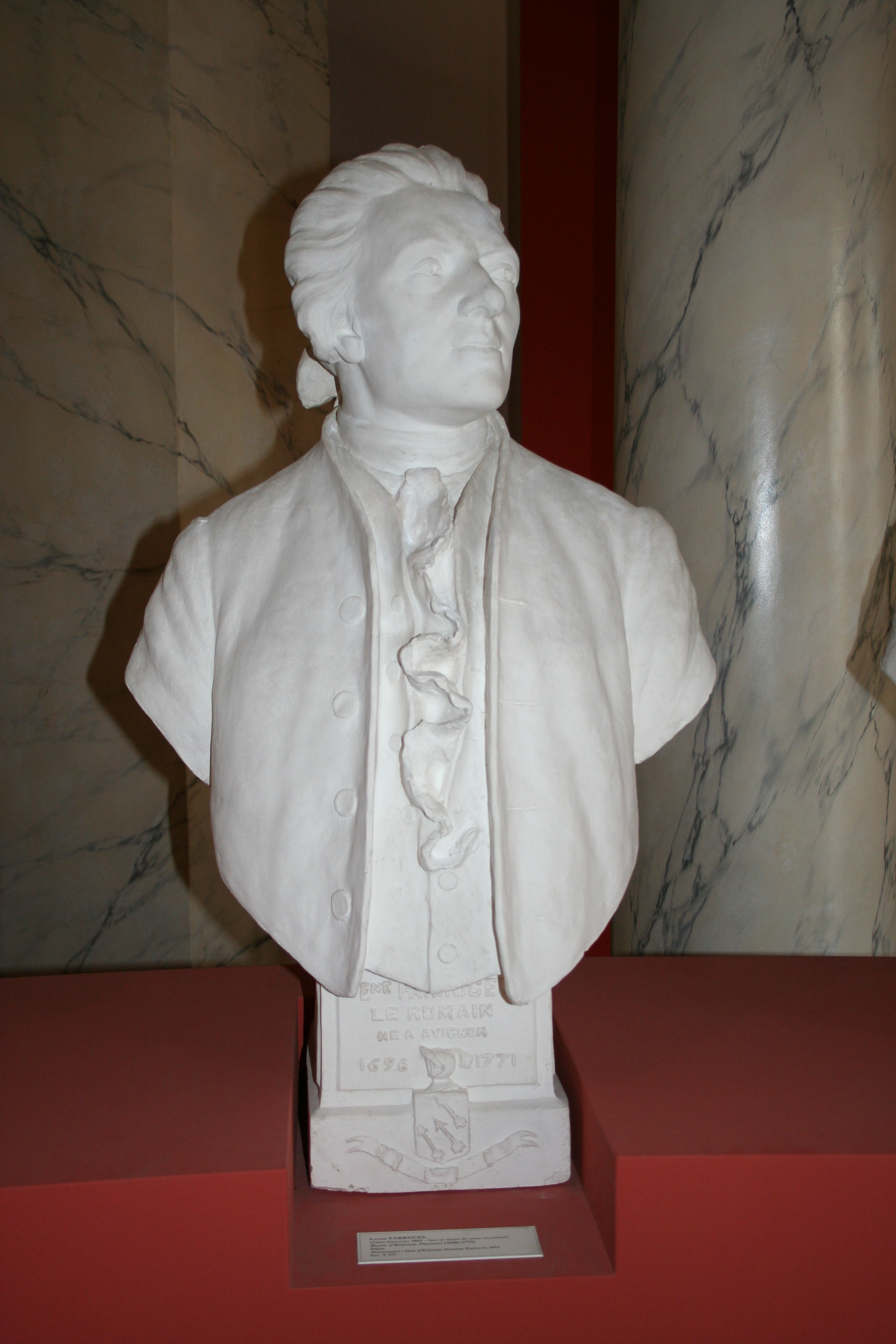 Buste d'étienne Parrocel(1696-1775) au musée Calvet d'Avignon. Sculpture de Louis Parroce(1865-?)